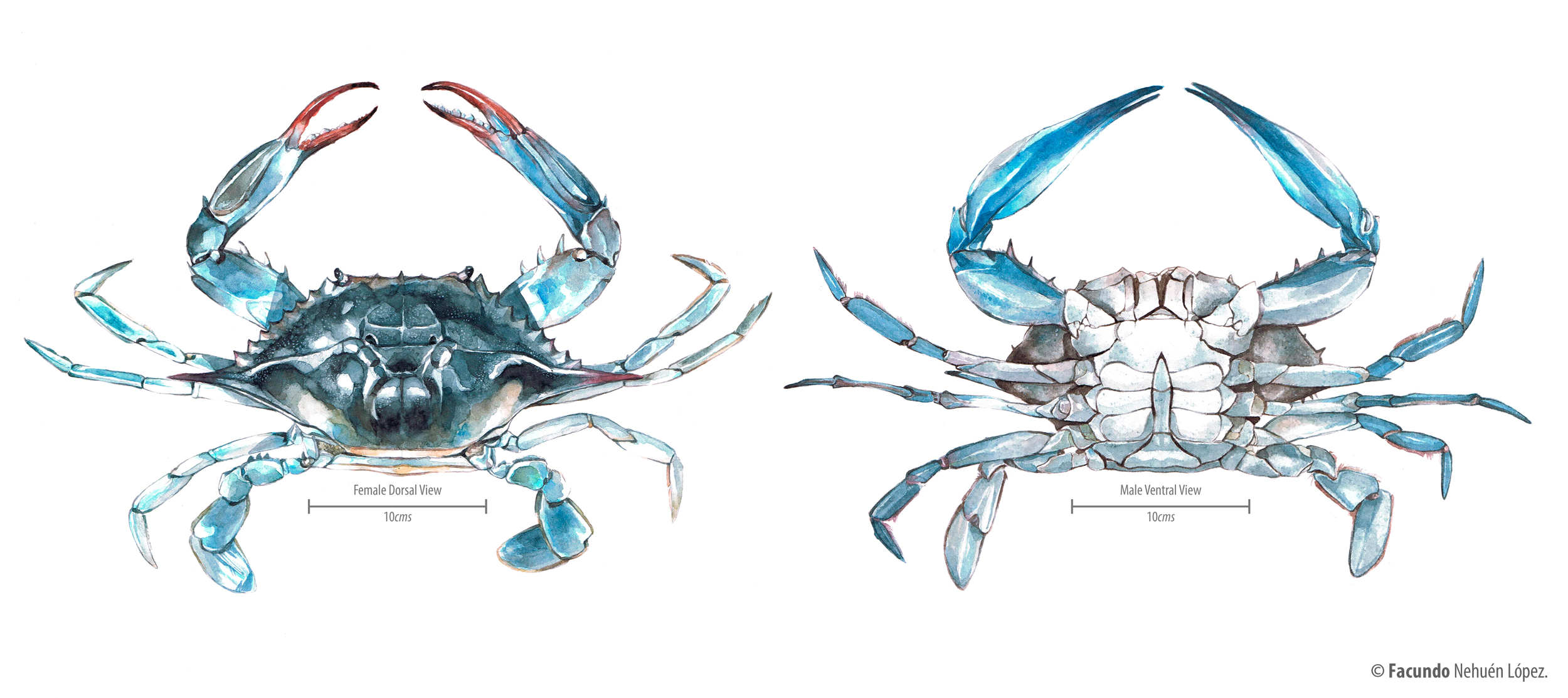 Ilustración científica del crustáceo Callinectes Sapidus. Vista dorsal de un espécimen hembra y vista ventral de un espécimen macho.